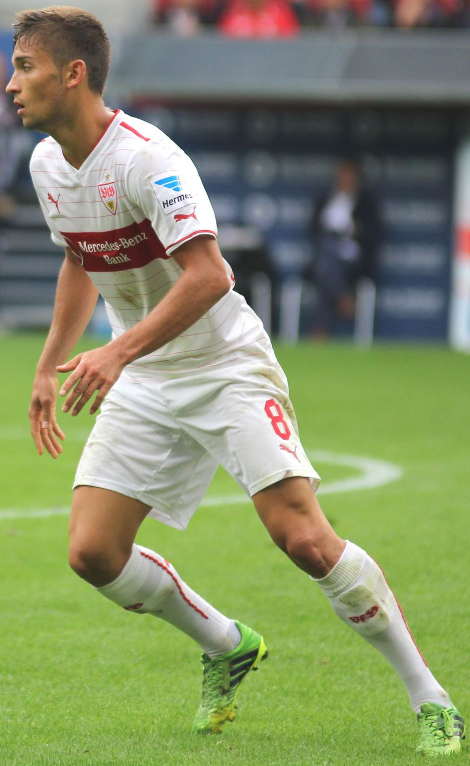 Moritz Leitner beim Spiel FC Augsburg gegen VfB Stuttgart am 25.08.2013.